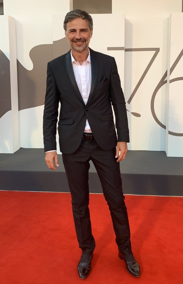 Beppe Convertini Venezia 2019